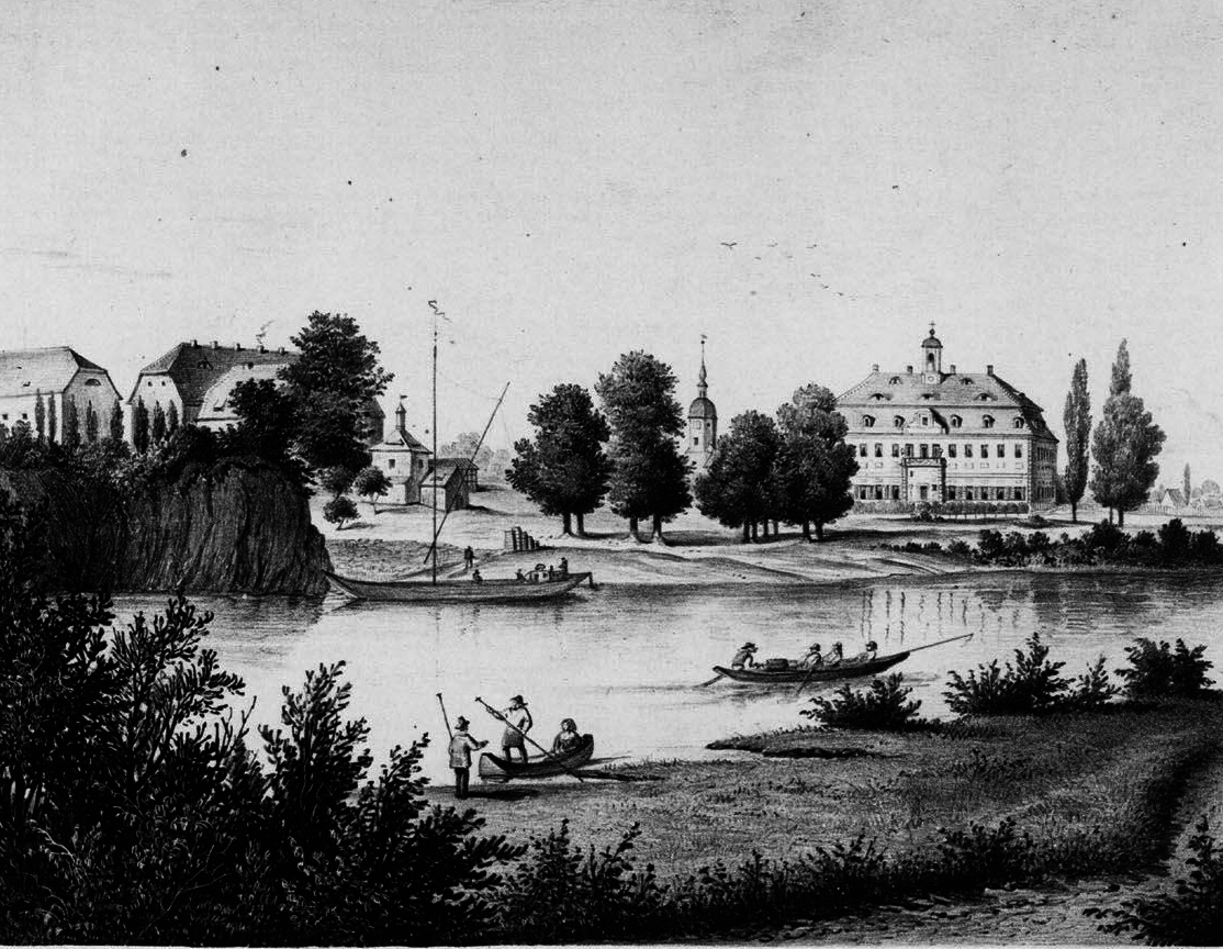 Bild von Schloß Gröba aus: Album der Rittergüter und Schlösser im Königreiche Sachsen Meissner Kreis Section: II